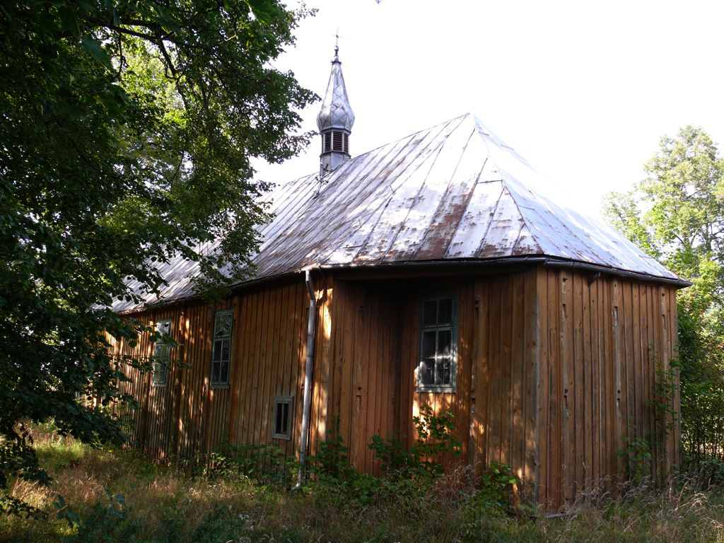 Seroczyn